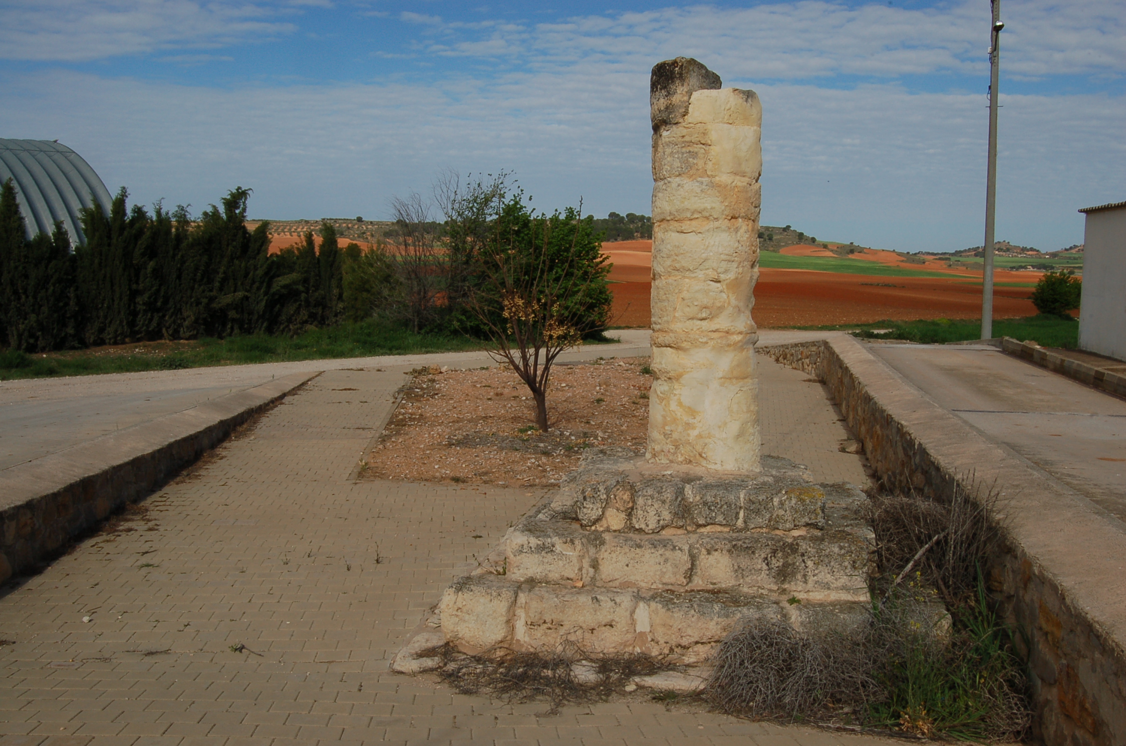 Rollo xurisdicional de Hontecillas, dado en 1426 por Xoán II de Castela